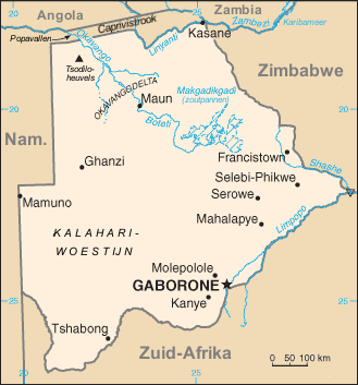 Nederlandse vertaling CIA-kaart door Danielm.